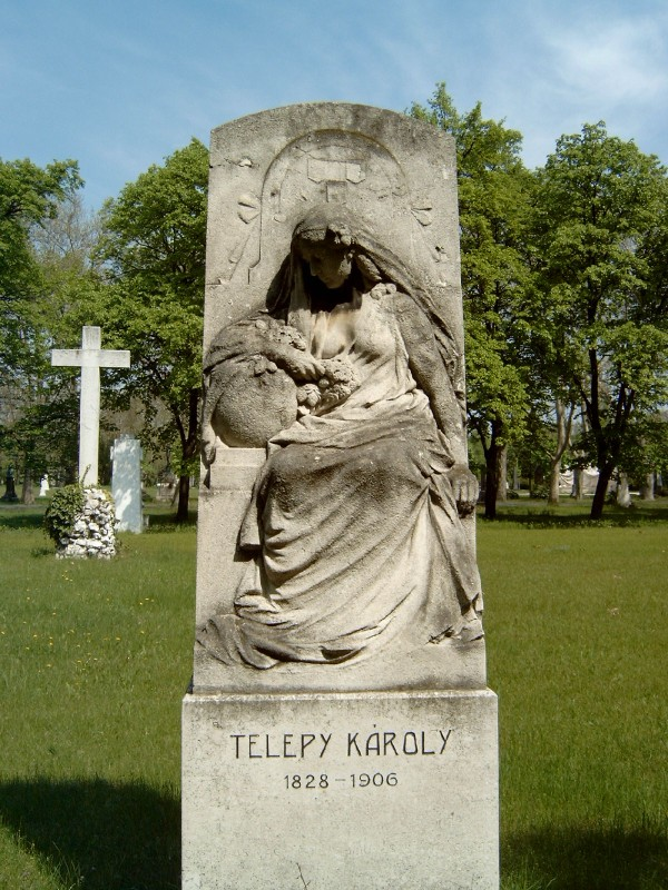 Telepy Károly (Debrecen, 1828. dec. 25. – Bp., 1906. szept. 30.): festő, Telepy György színész fiának sírja Budapesten. Kerepesi temető: 29/3-3-45 [szobrász: Róna József].